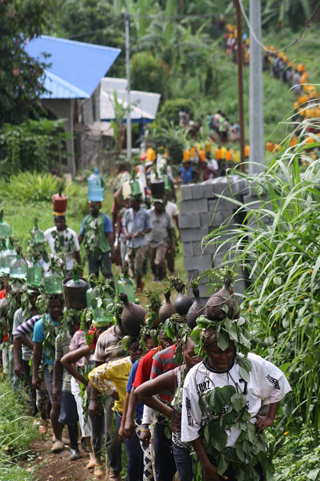 Botoi o ritual de fecundidad del pueblo bubi, en la Isla de Bioko. Festividad tradicional en Rebola, Guinea Ecuatorial. This is an image of "African people at work" from Equatorial Guinea